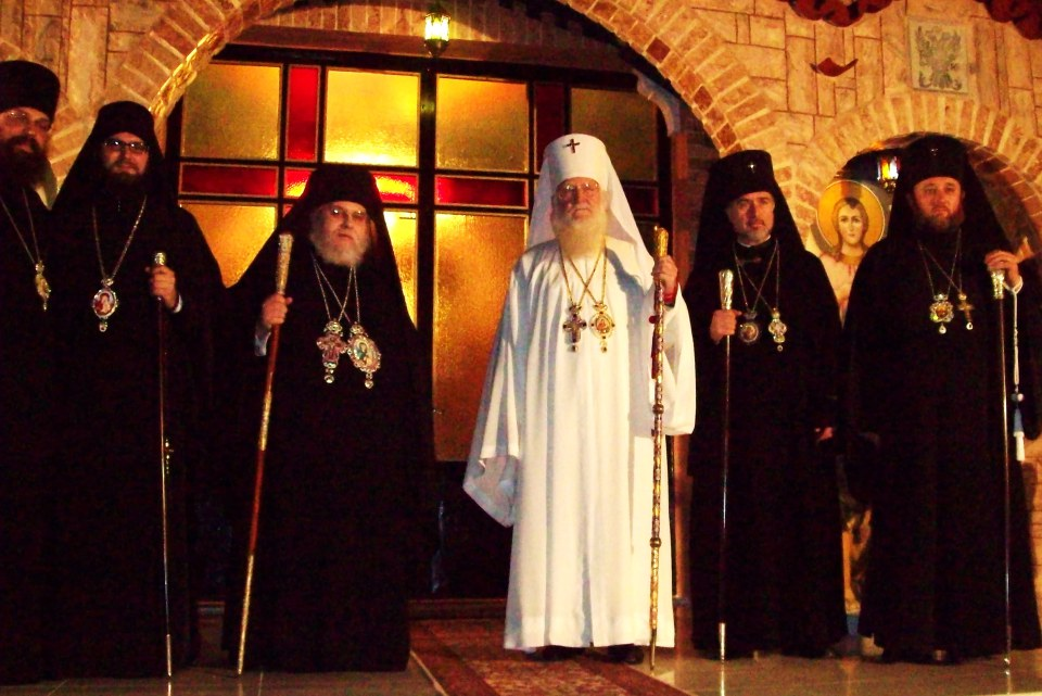 Mitropolit Evloghios, Anghelos , Bishop Porfirios and Bishop Avondios